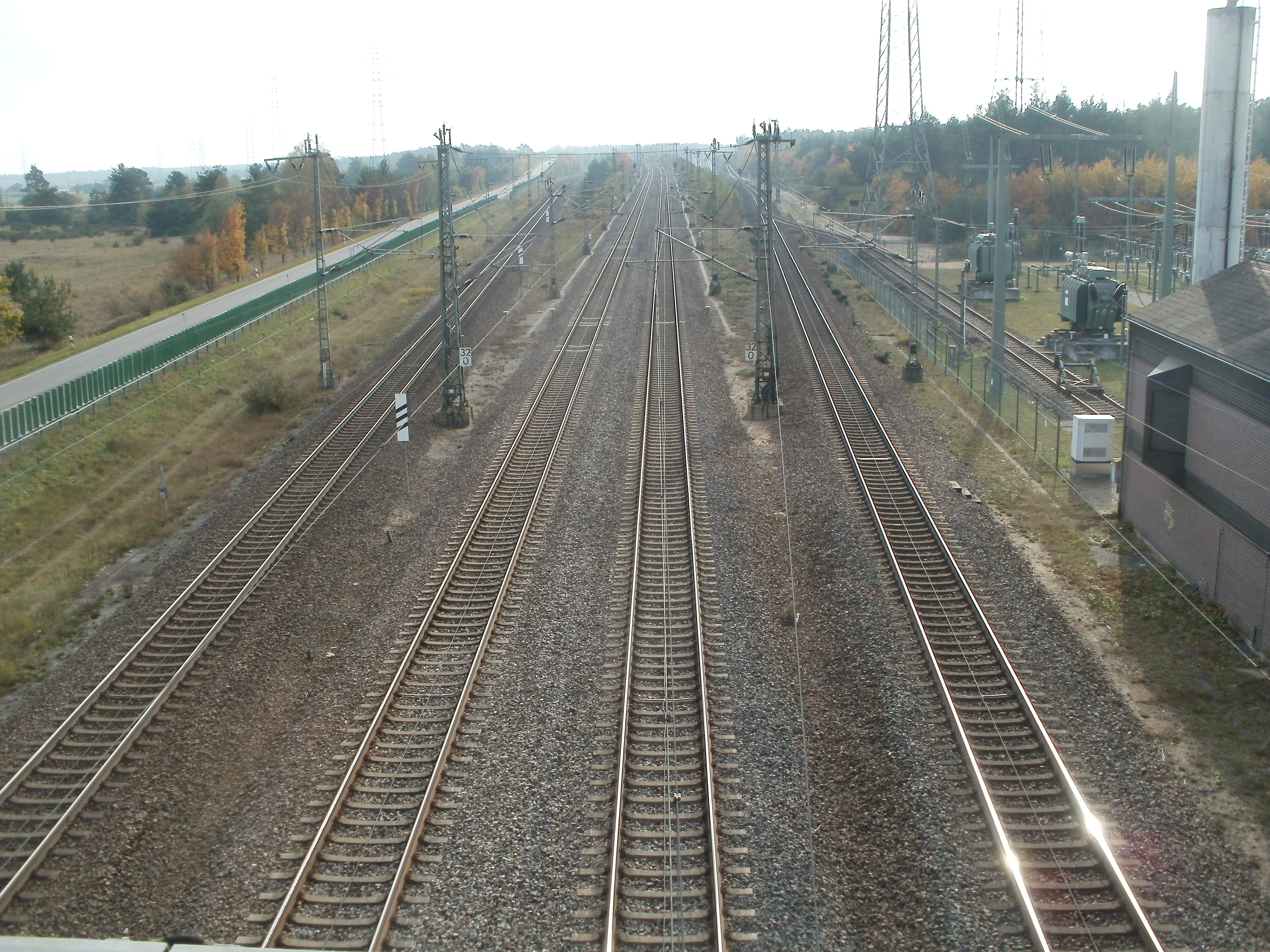 Neubaustrecke Mannheim–Stuttgart bei Wiesental, rechts Unterwerk Wiesental